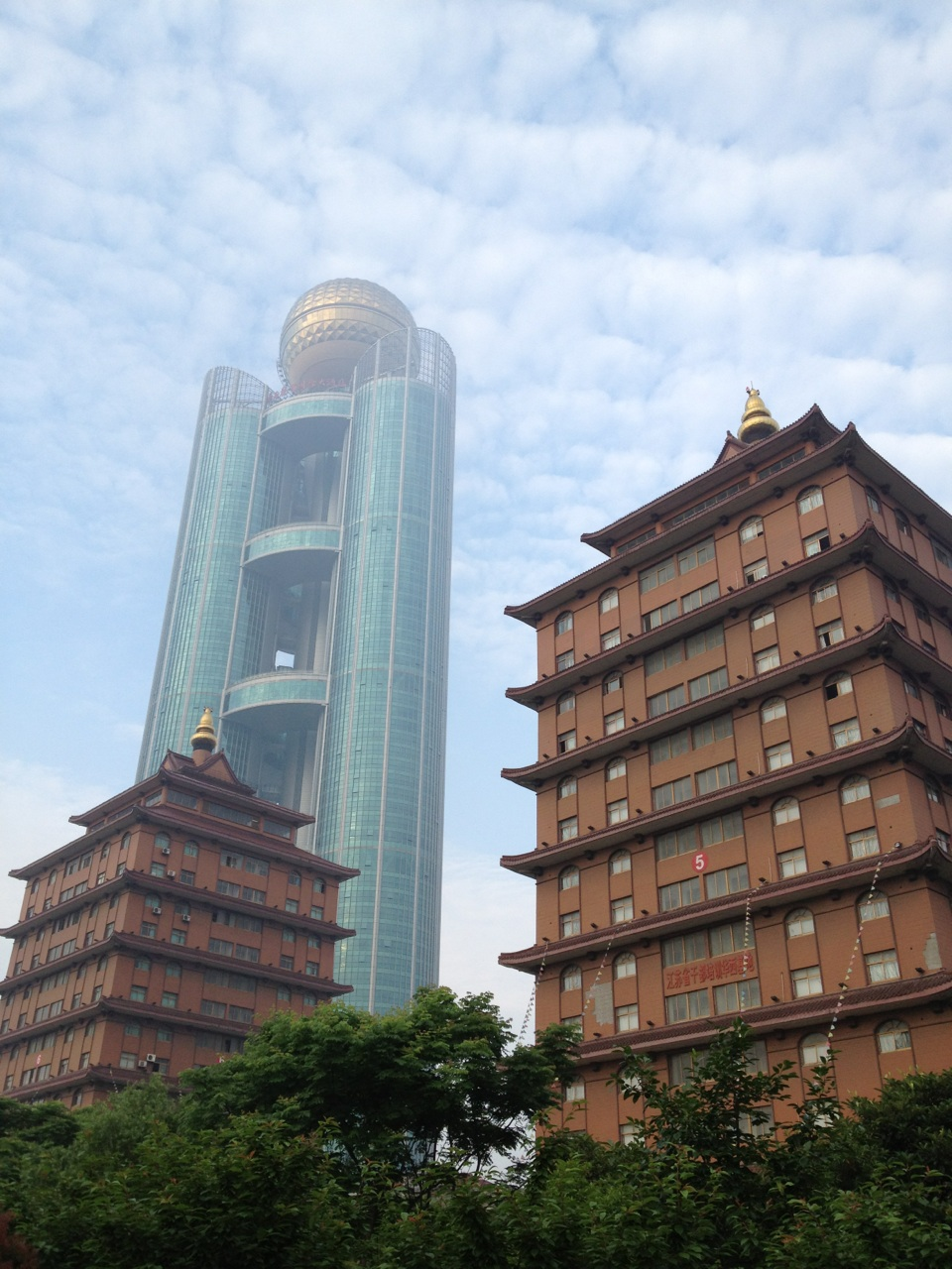 Hanging Village of Huaxi, Wuxi (May 2012)